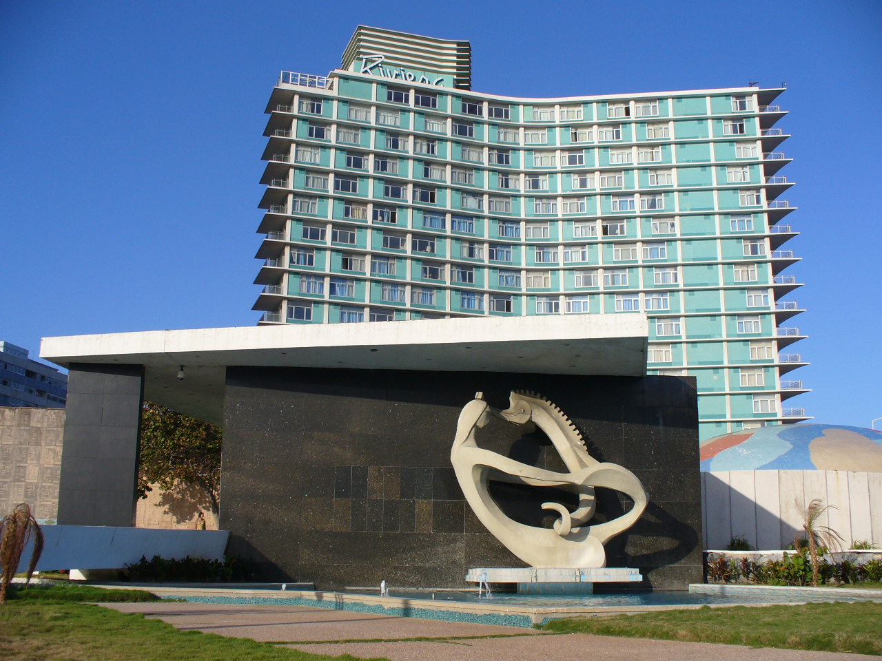 Um dos hoteis mais tradicionais de Havana